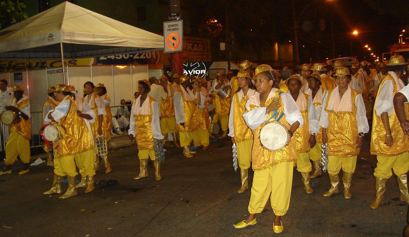 GRES Matriz de São João de Meriti|2010